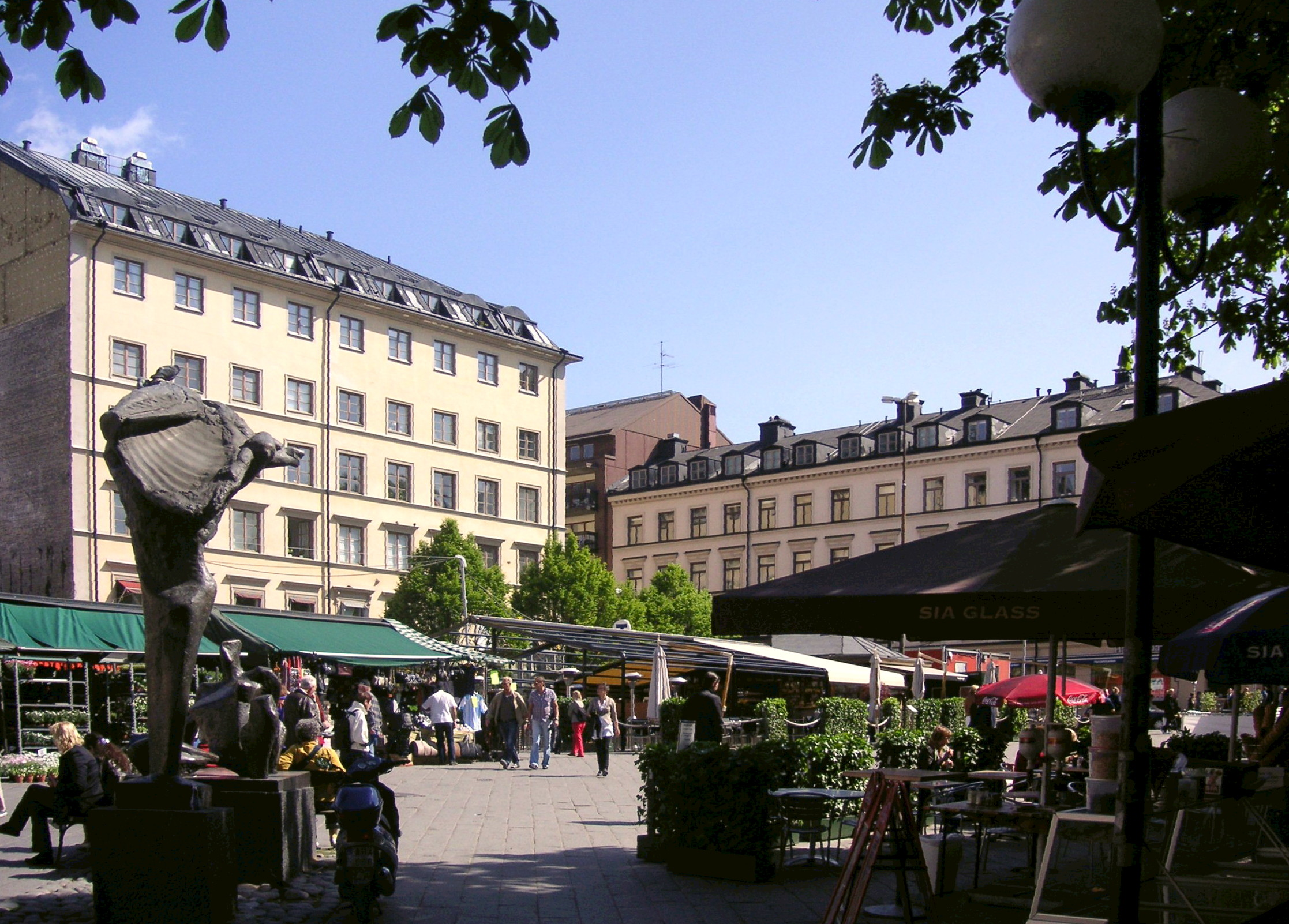 Östermalms torg in Stockholm